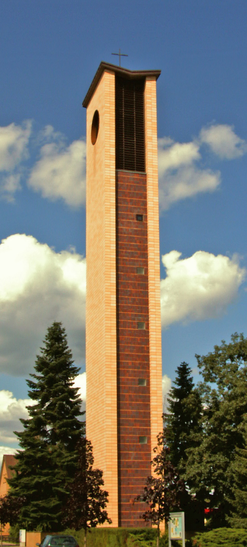 Turm der katholischen Kirche St. Michael in Munster, Heidekreis